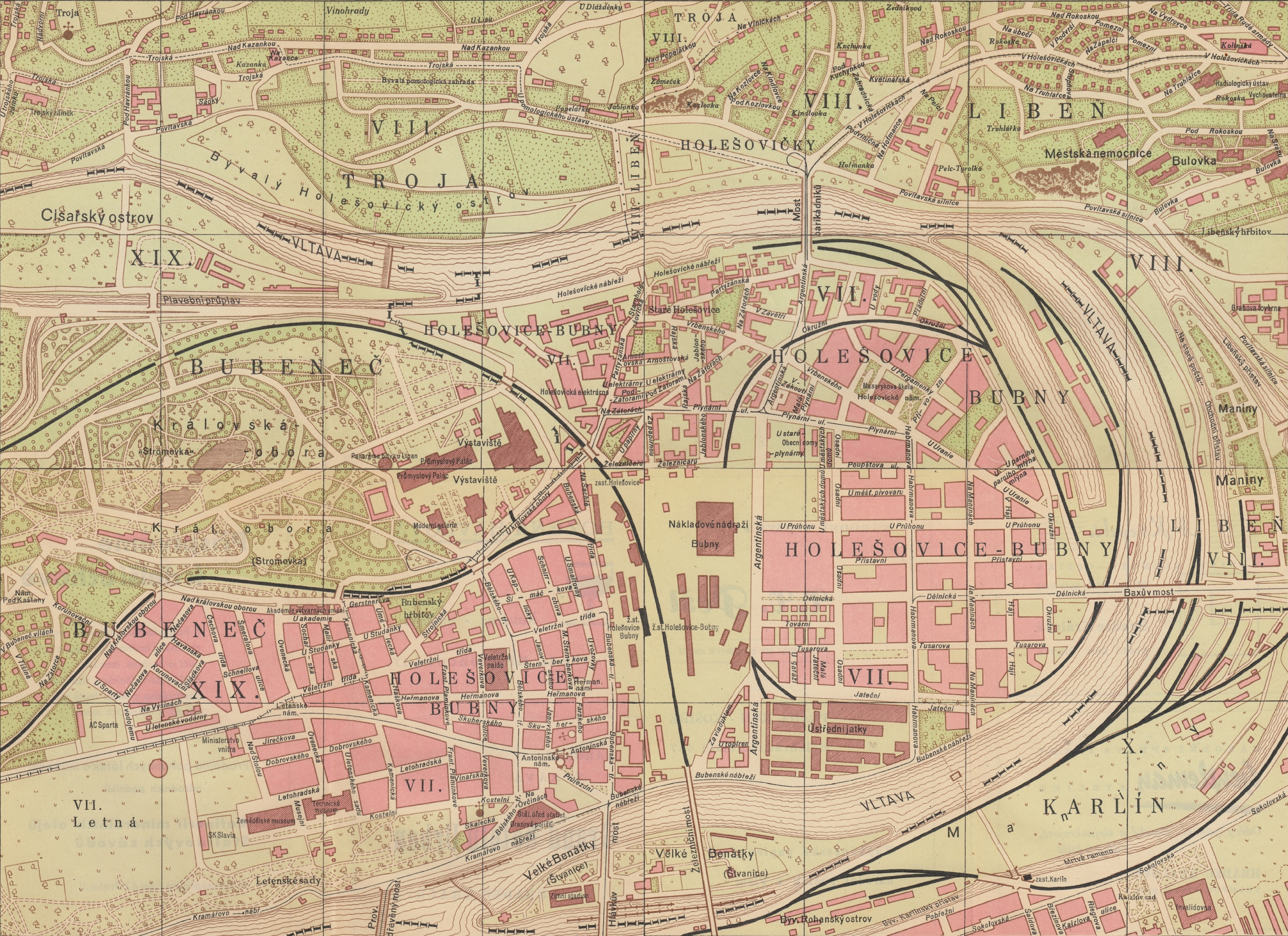 Praha XIX. Holešovice - Bubny, plán zobrazuje stav z druhé poloviny 40. let 20. století. Zpracováno na základě dat z Orientační knihy Velké Prahy, mapové listy 10, 11, 19 a 20.